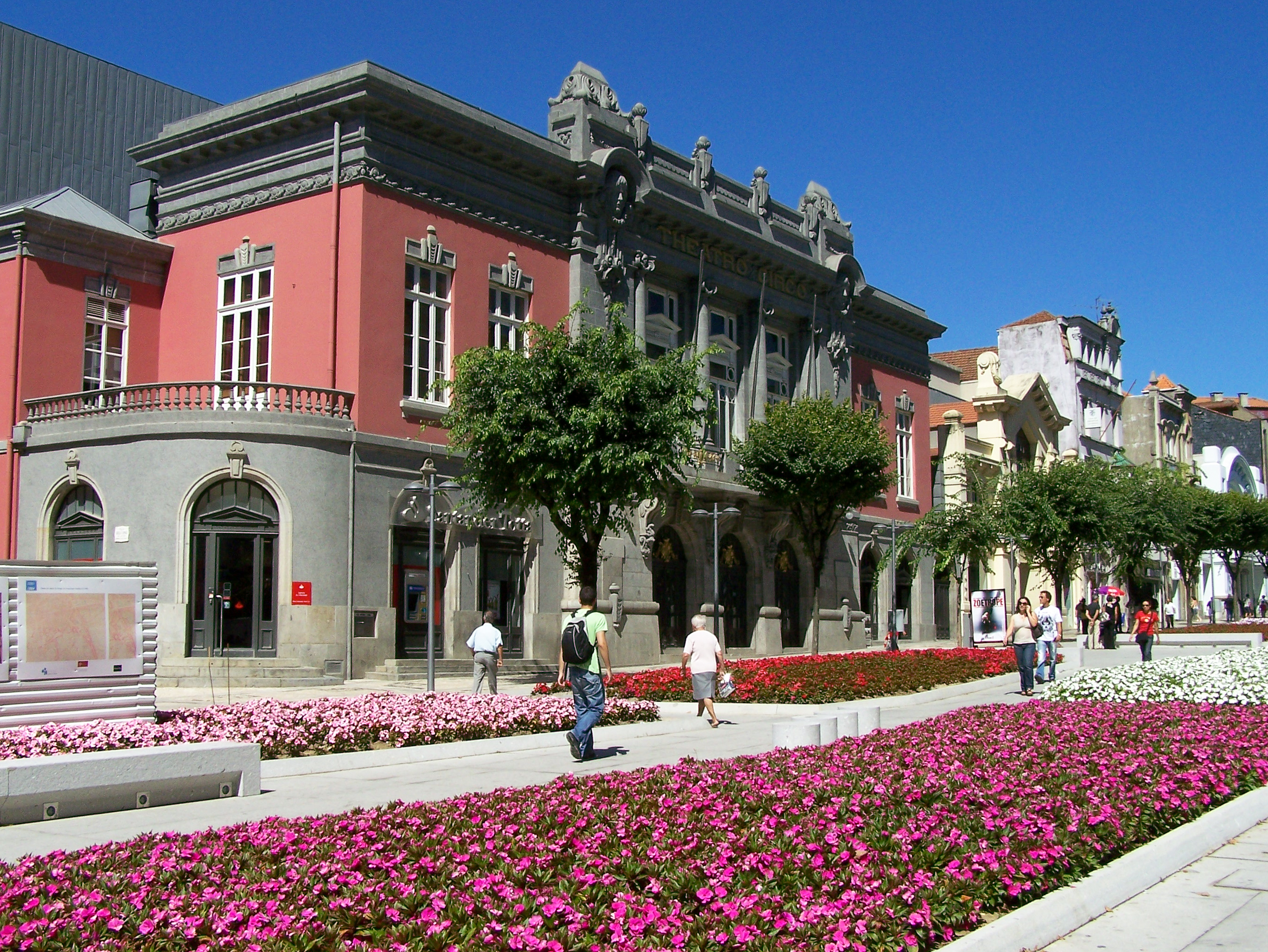 Cidade de Braga This file was uploaded for Wiki Loves Monuments in Portugal with the unique identifier 71275.